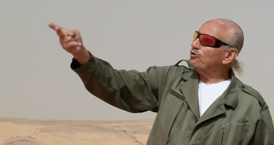 photo de plateau Crépuscule des Ombres